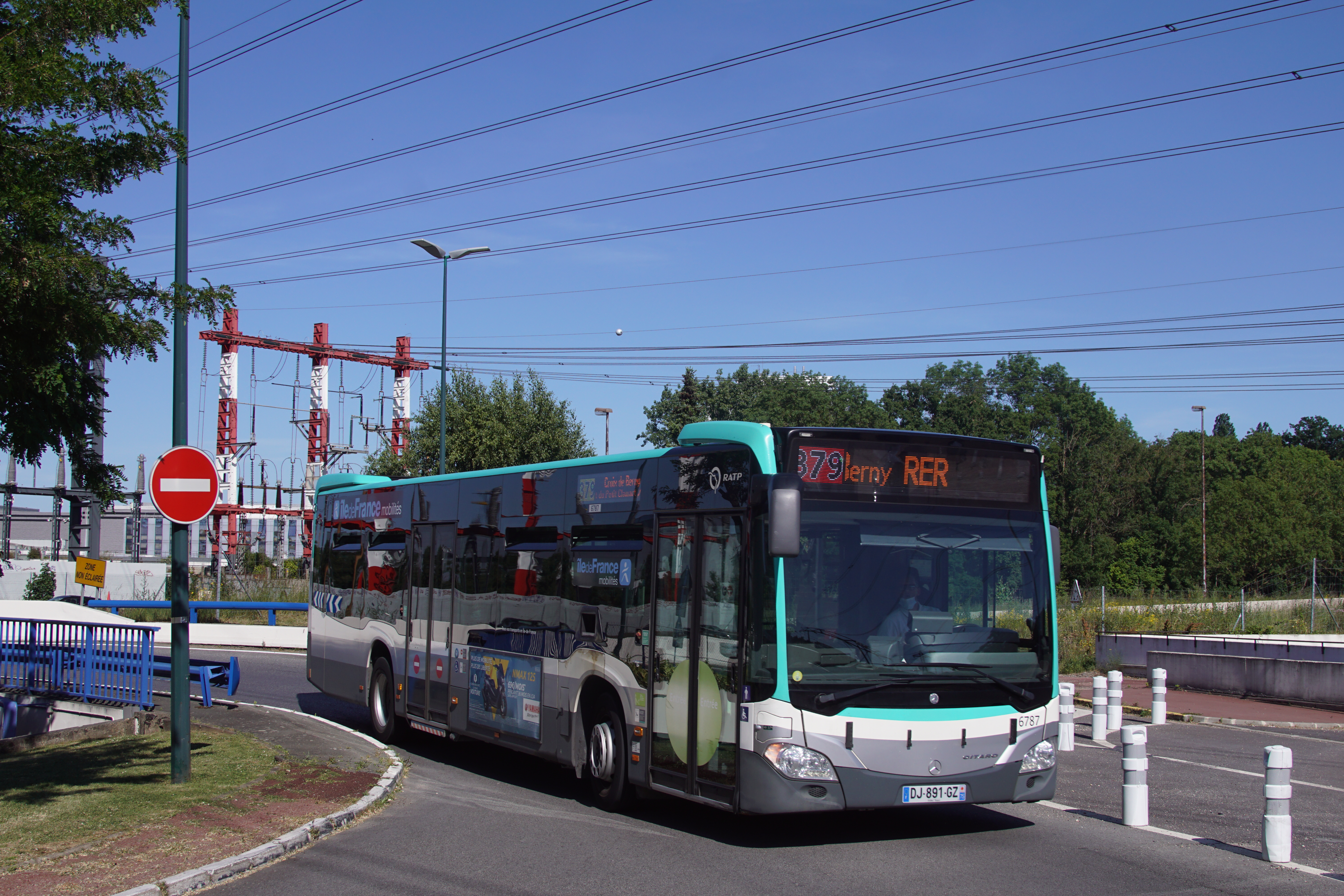 Un des Mercedes-Benz Citaro C2 sur la ligne 379, entrant à La Boursidière.